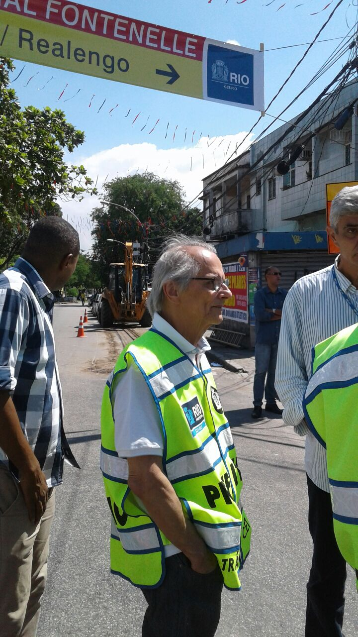 Foto do Vice-Prefeito do Rio de Janeiro em 2017, Fernando Mac Dowell, participando de uma vistoria